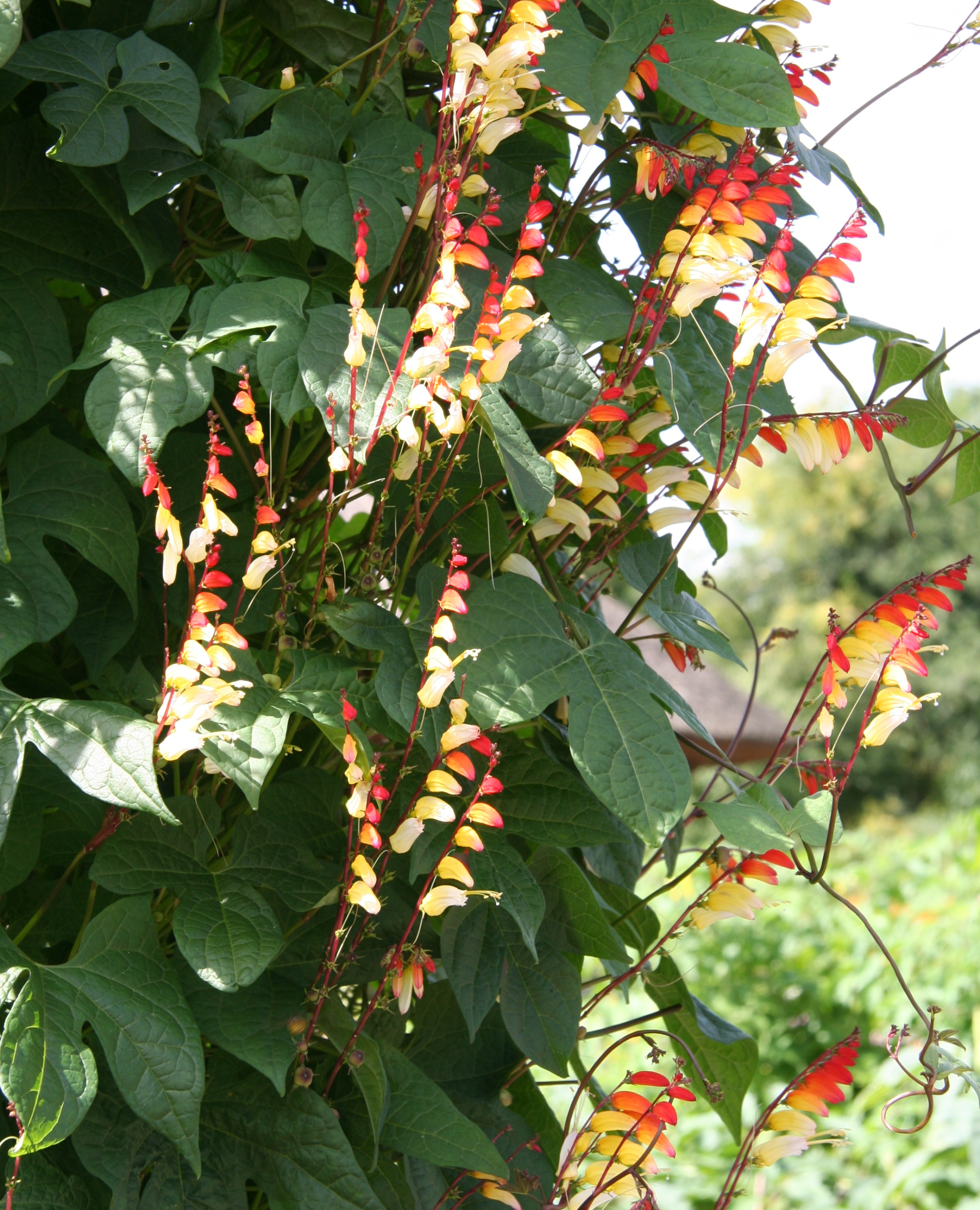 Ipomoea lobata im Botanischen Garten Dresden